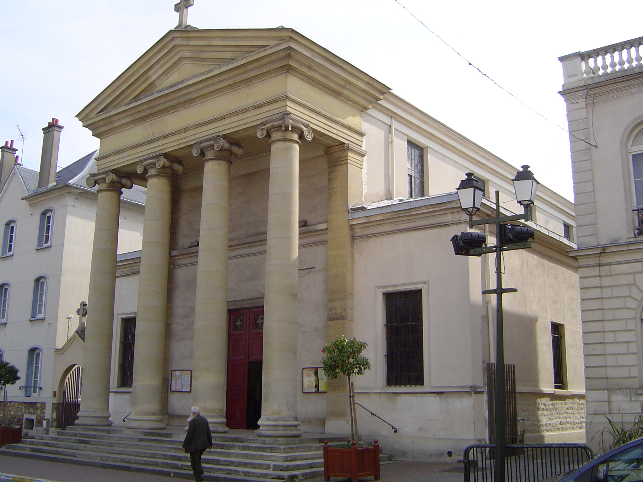 Photos prises à Bourg-la-Reine, commune française des Hauts-de-Seine